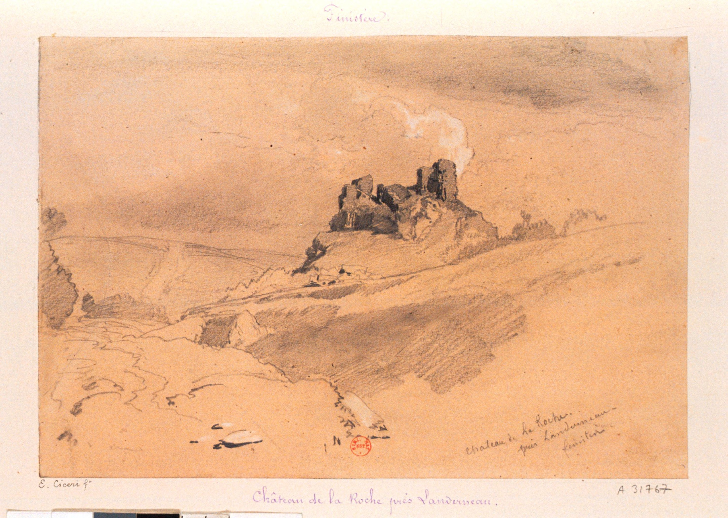 La Roche-Maurice : dessin du château de Roc'h-Morvan (dessin de Léon Gaucherel, vers 1840